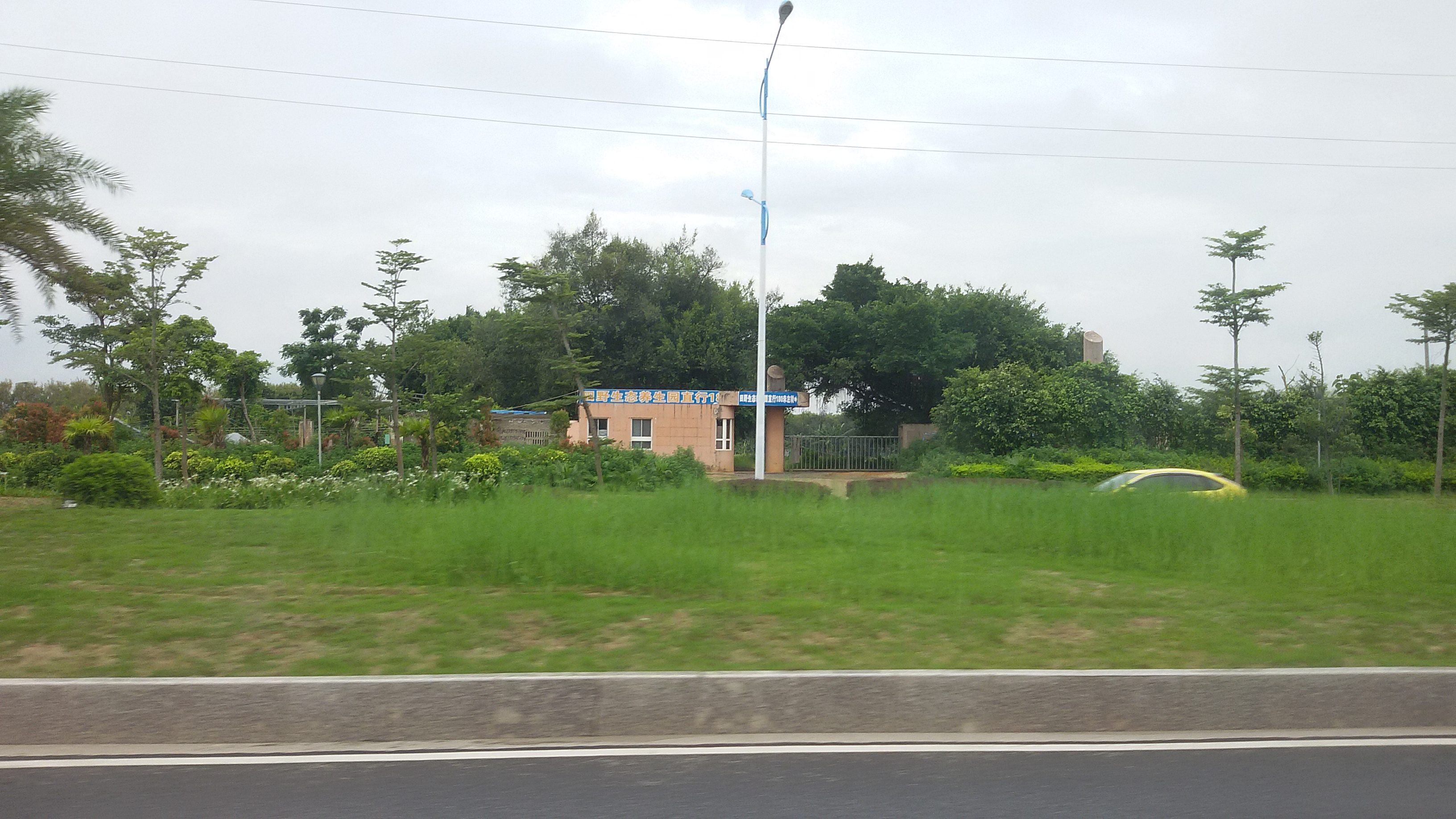 粵語: 田野生态旅游养生园出口